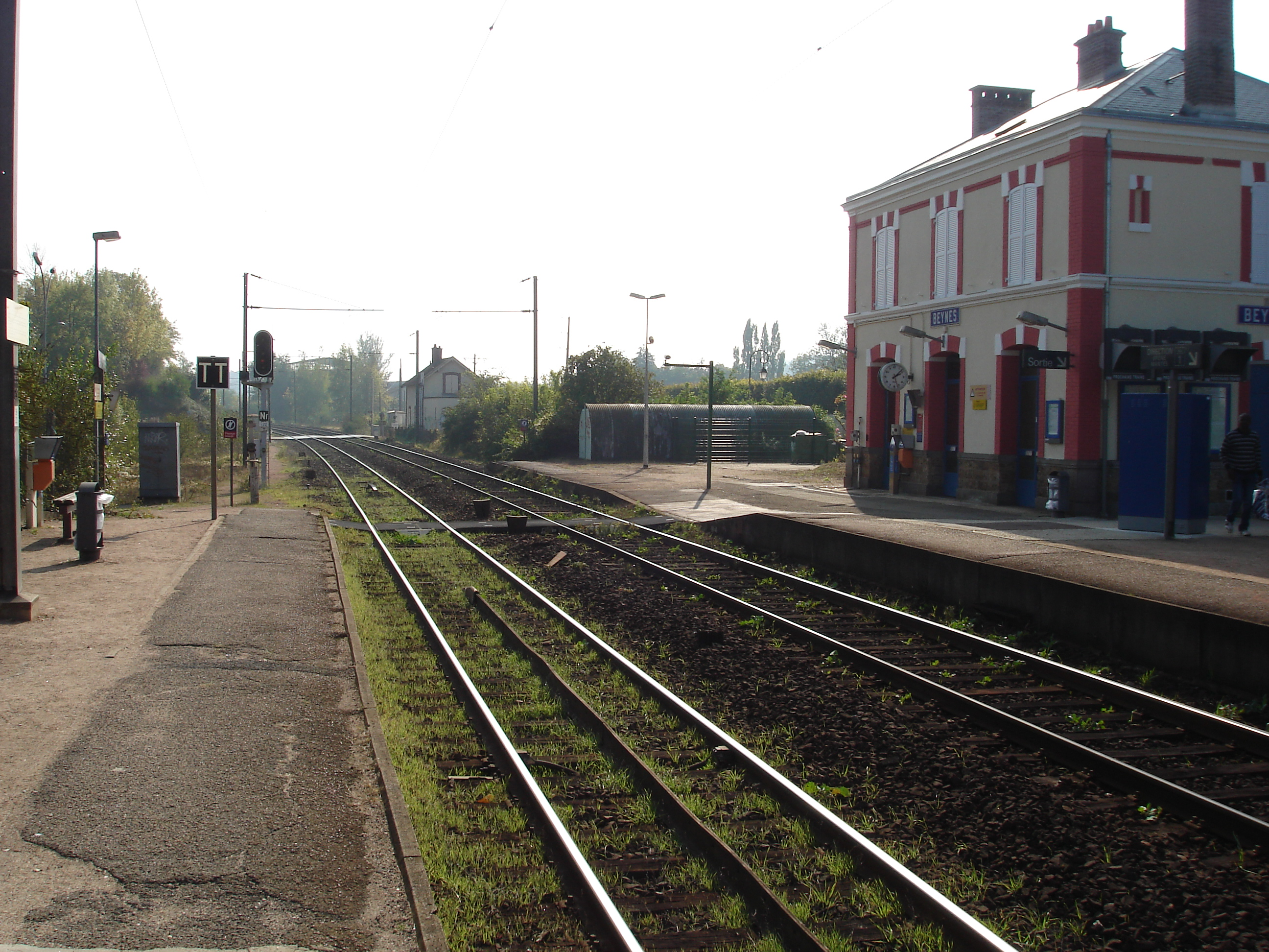 Gare de Beynes (78) : Vue en direction de Paris, de extrémités des quais.